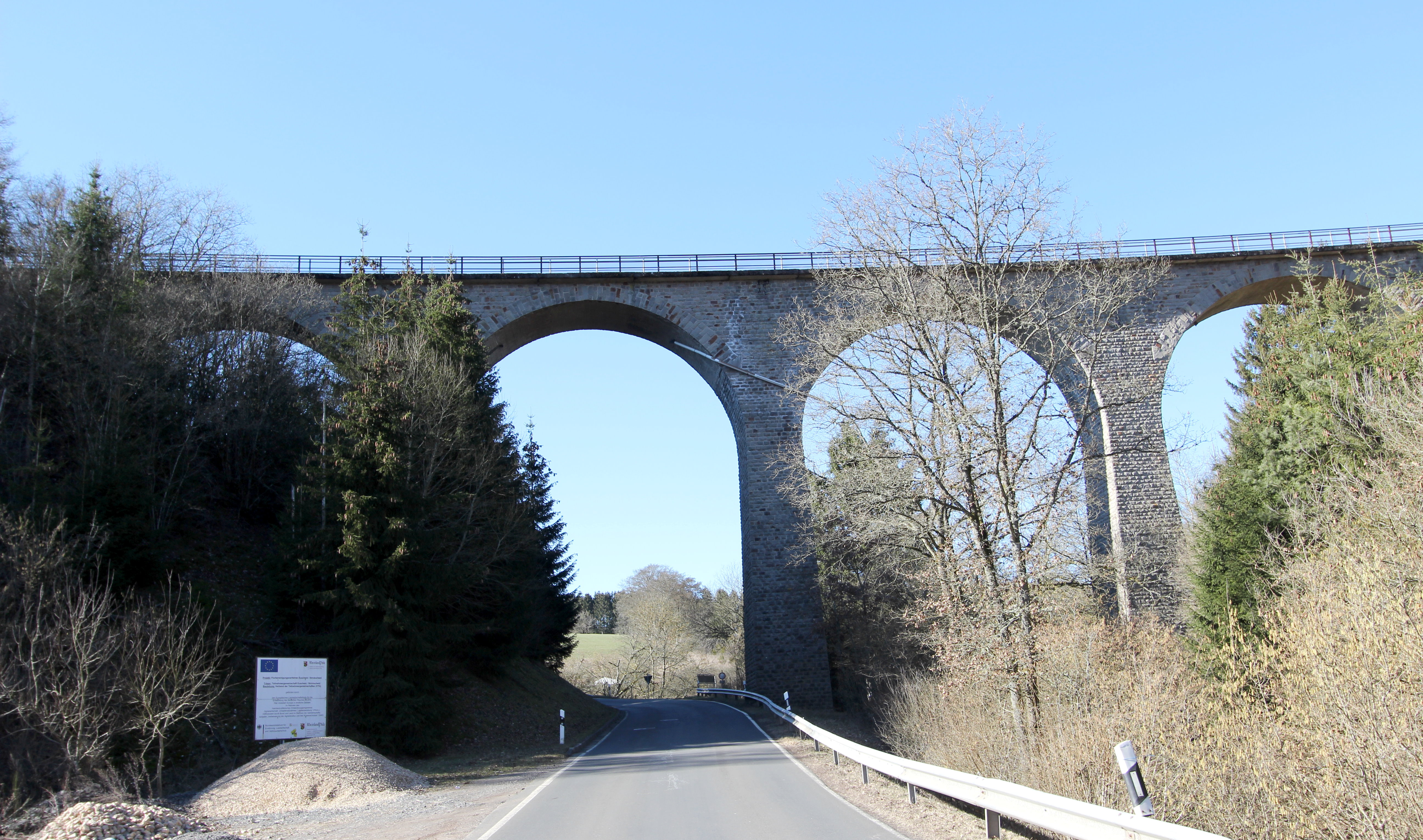 Südöstlich von Strickscheid steht das Eisenbahnviadukt der Enztalbahn; fünfbogige bossenquaderverblendete Betonkonstruktion, gegen 1907. Aufnahme von 2019.